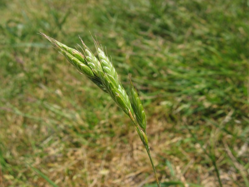 Weiche Trespe Bromus hordeaceus, Nähe Zingst auf dem Darß